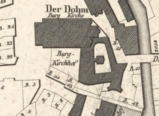 Der Burgkirchhof (heute Domplatz) in Braunschweig 1829.